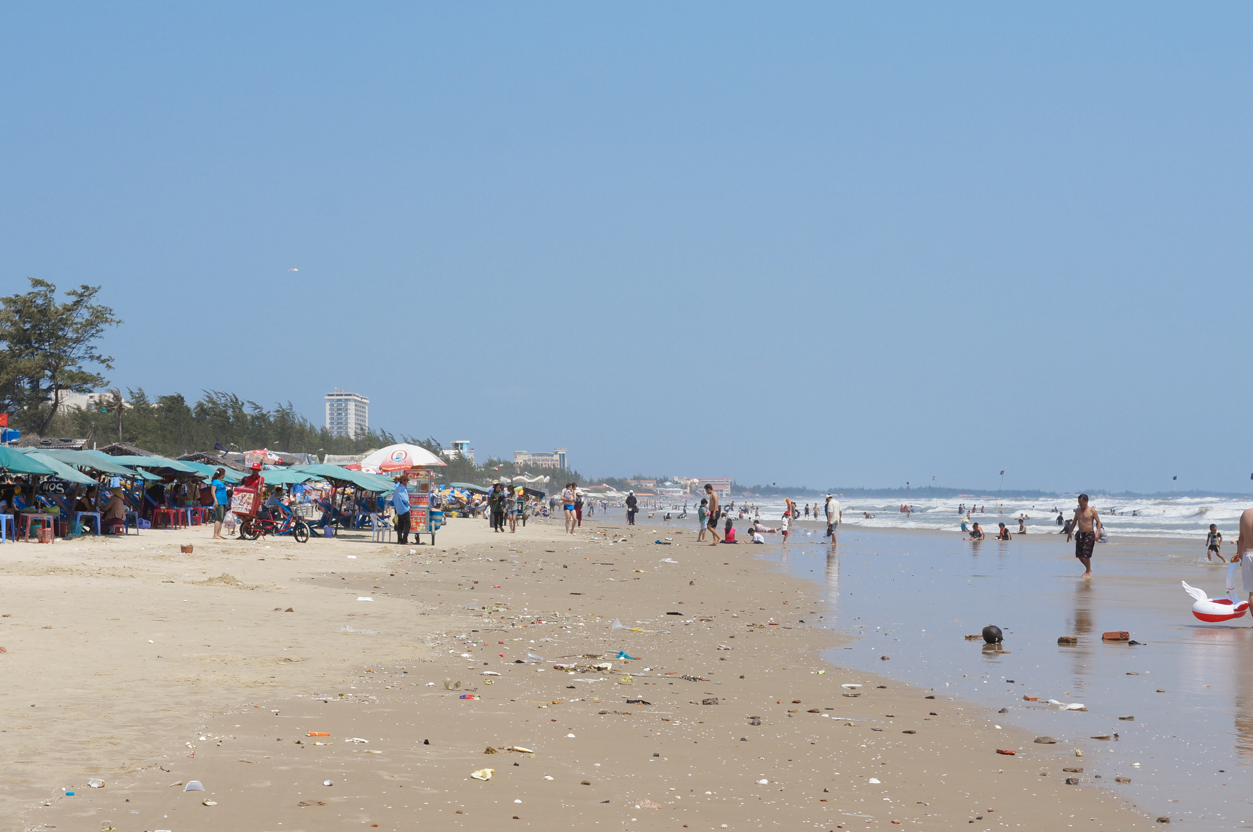 Bãi tắm Bãi sau, Vũng Tàu